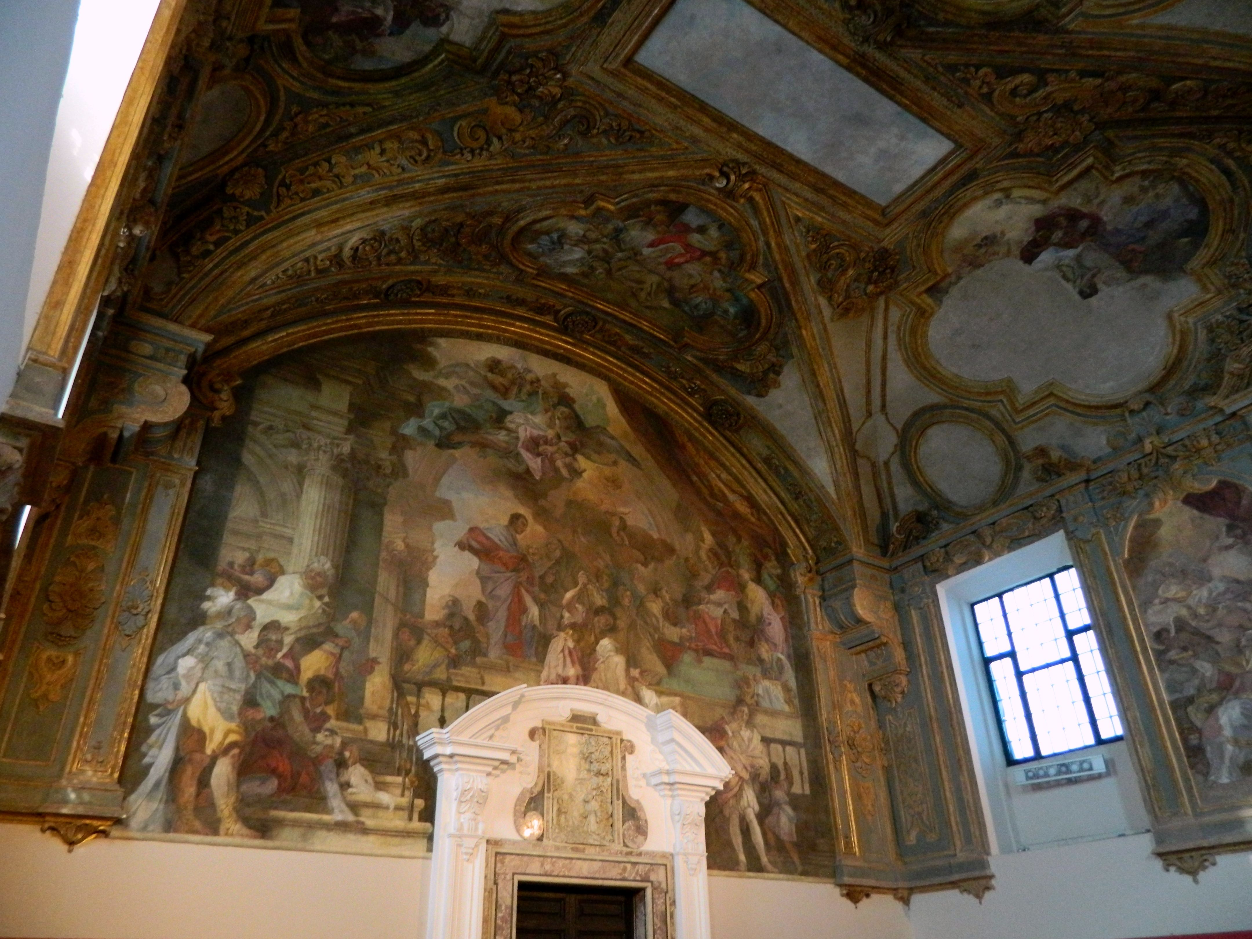 Coro delle monache della chiesa di Santa Maria Donnaregina Nuova di Napoli